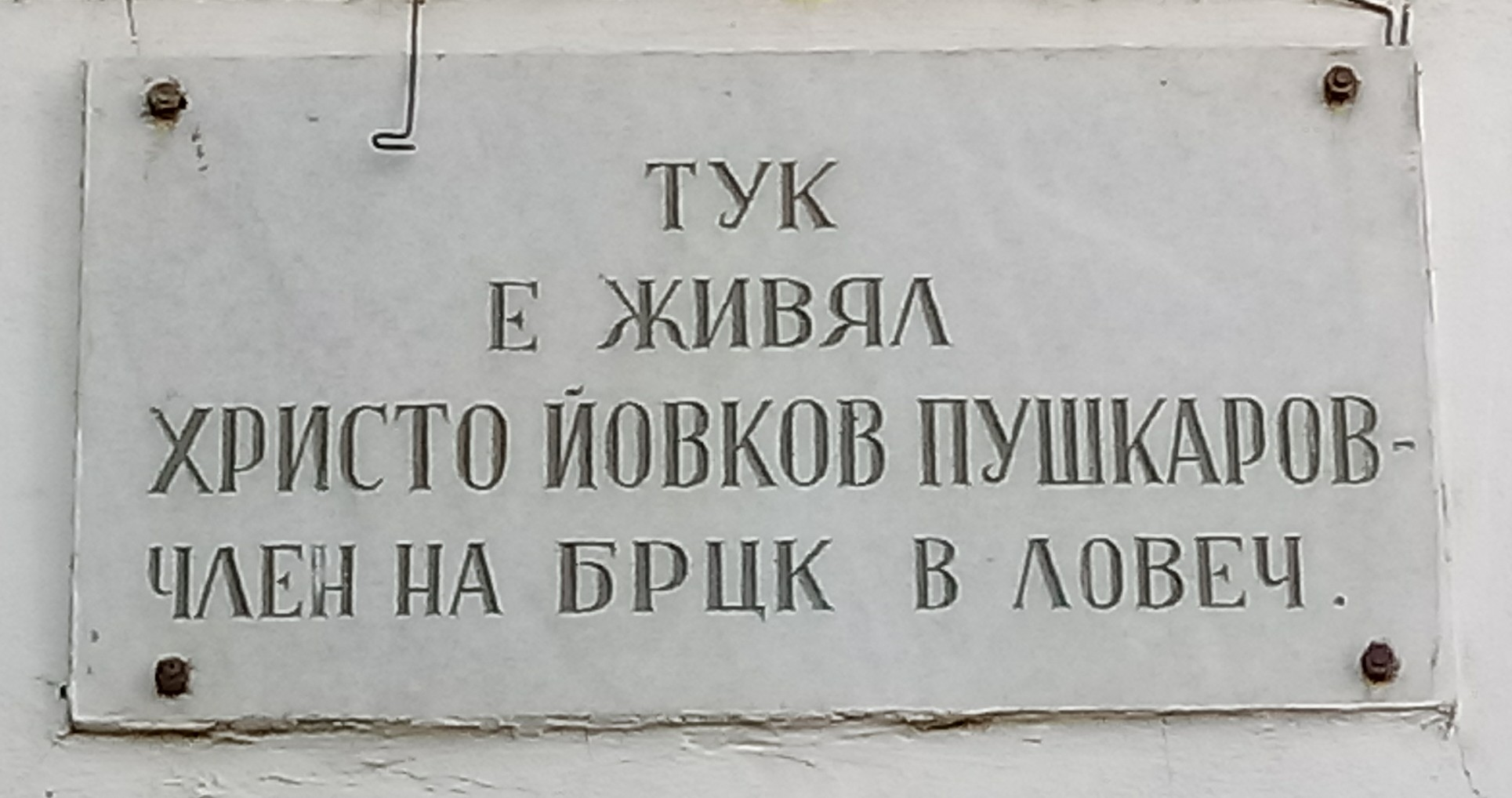 Hristo Yovkov Pushkarov memorial plaque, Lovech